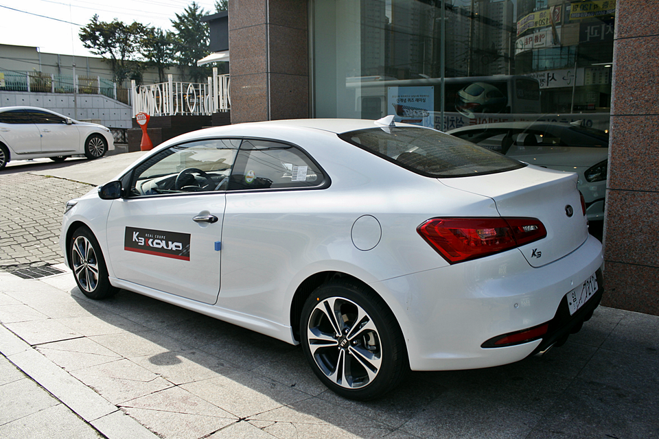 2013년 8월 27일에 출시된 기아 K3 쿱